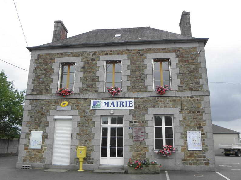 Mairie de Dompierre-du-Chemin (35).